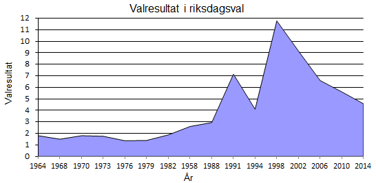 David Högberg.